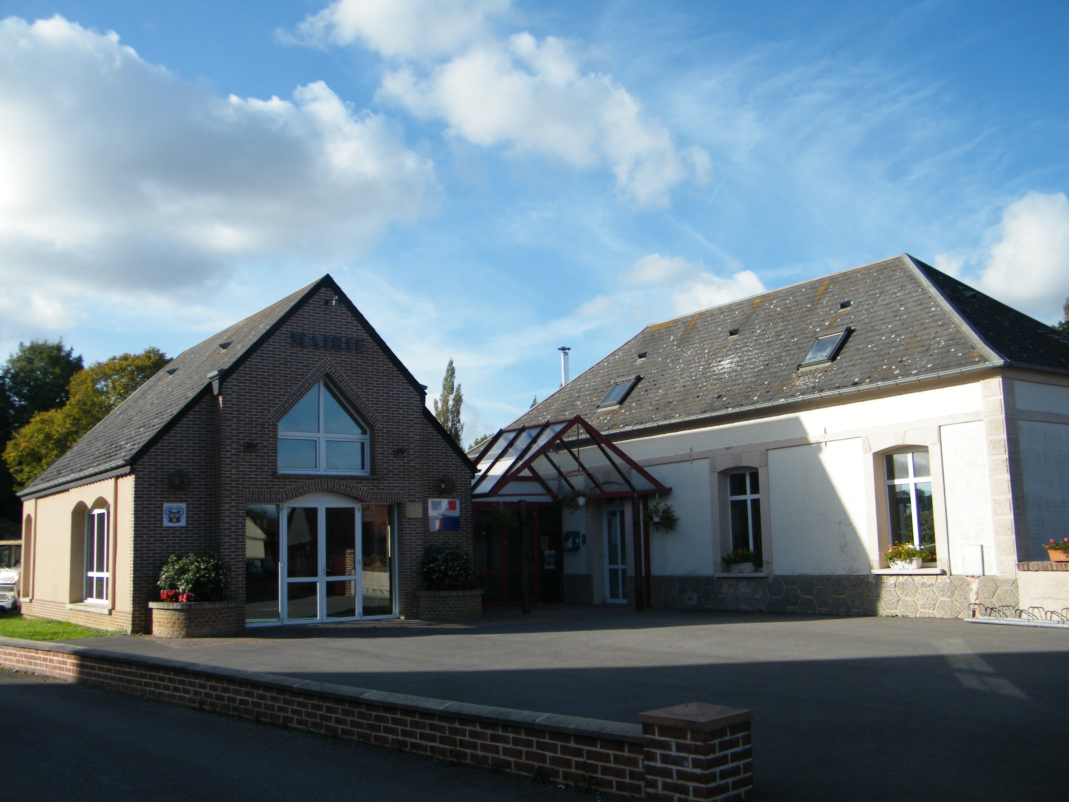 Valines, Somme, Fr, mairie.